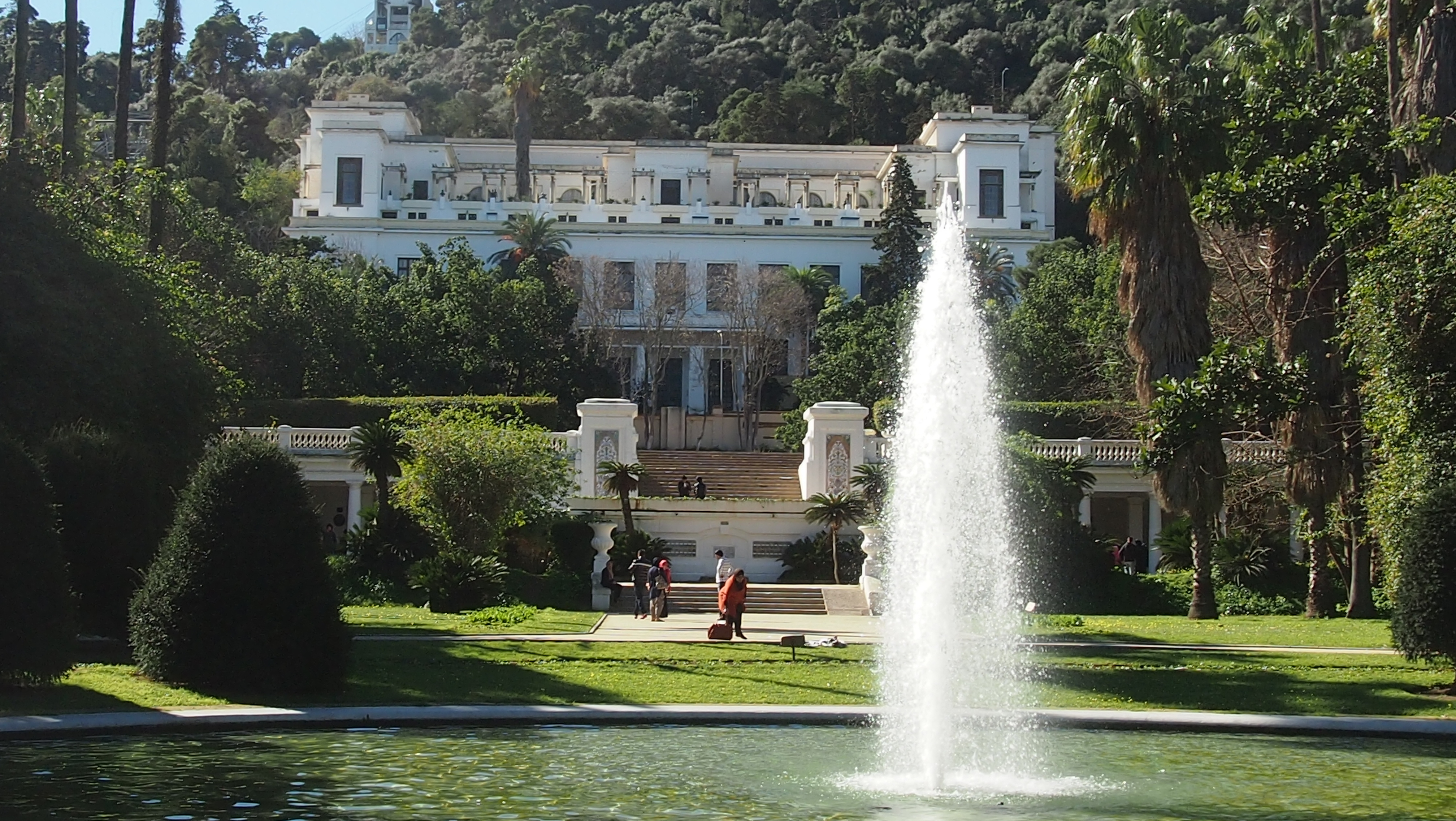 Une fontaine en plein centre du jardin d'essai à Alger 1